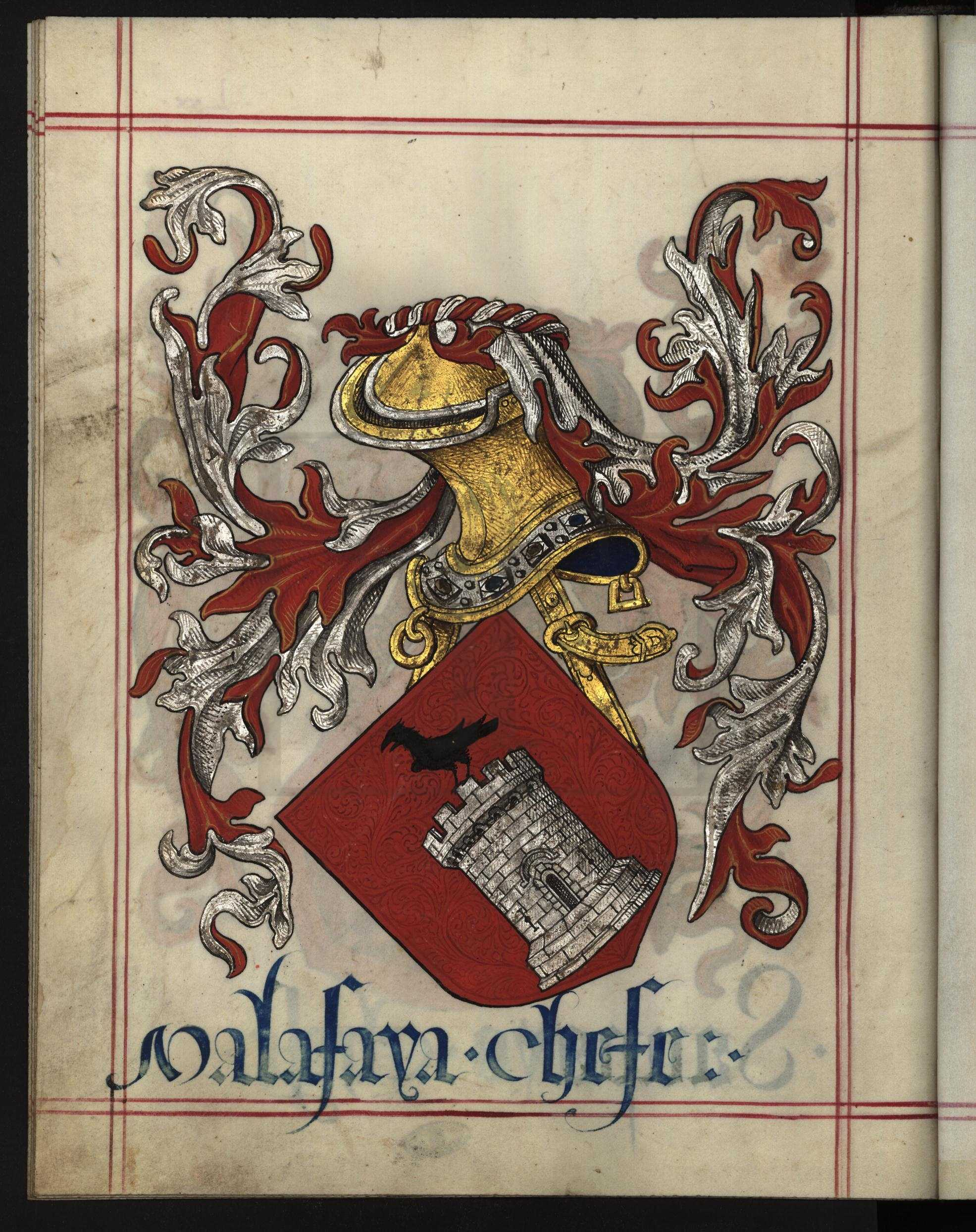 Armas de Malafaia no Livro do Armeiro-Mor (1509)